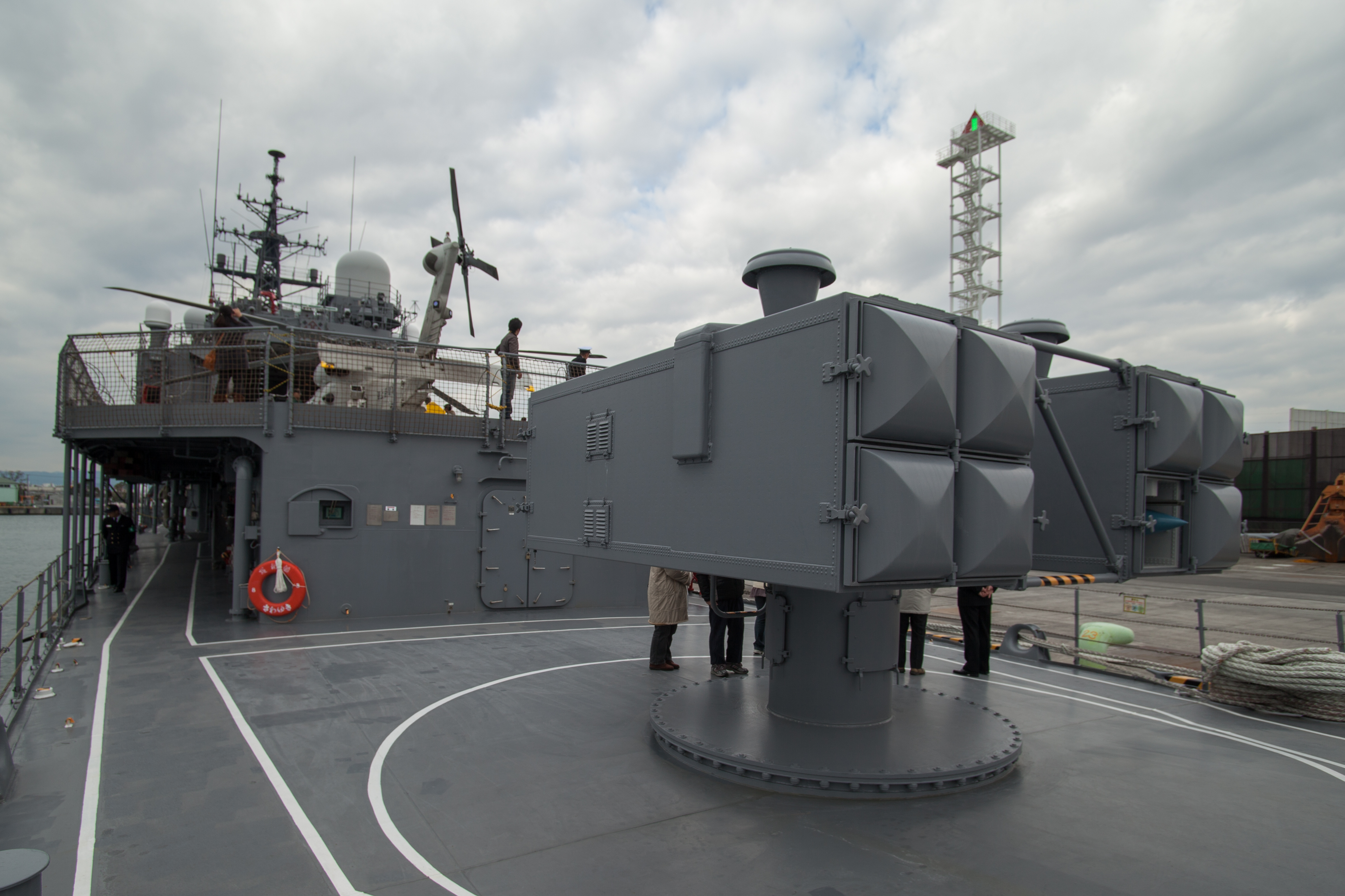 護衛艦さわゆきの艦尾甲板。写真手前がMk29シースパロー短SAM8連装発射機。田子の浦港での一般公開中に撮影。 撮影者のブログはこちら。